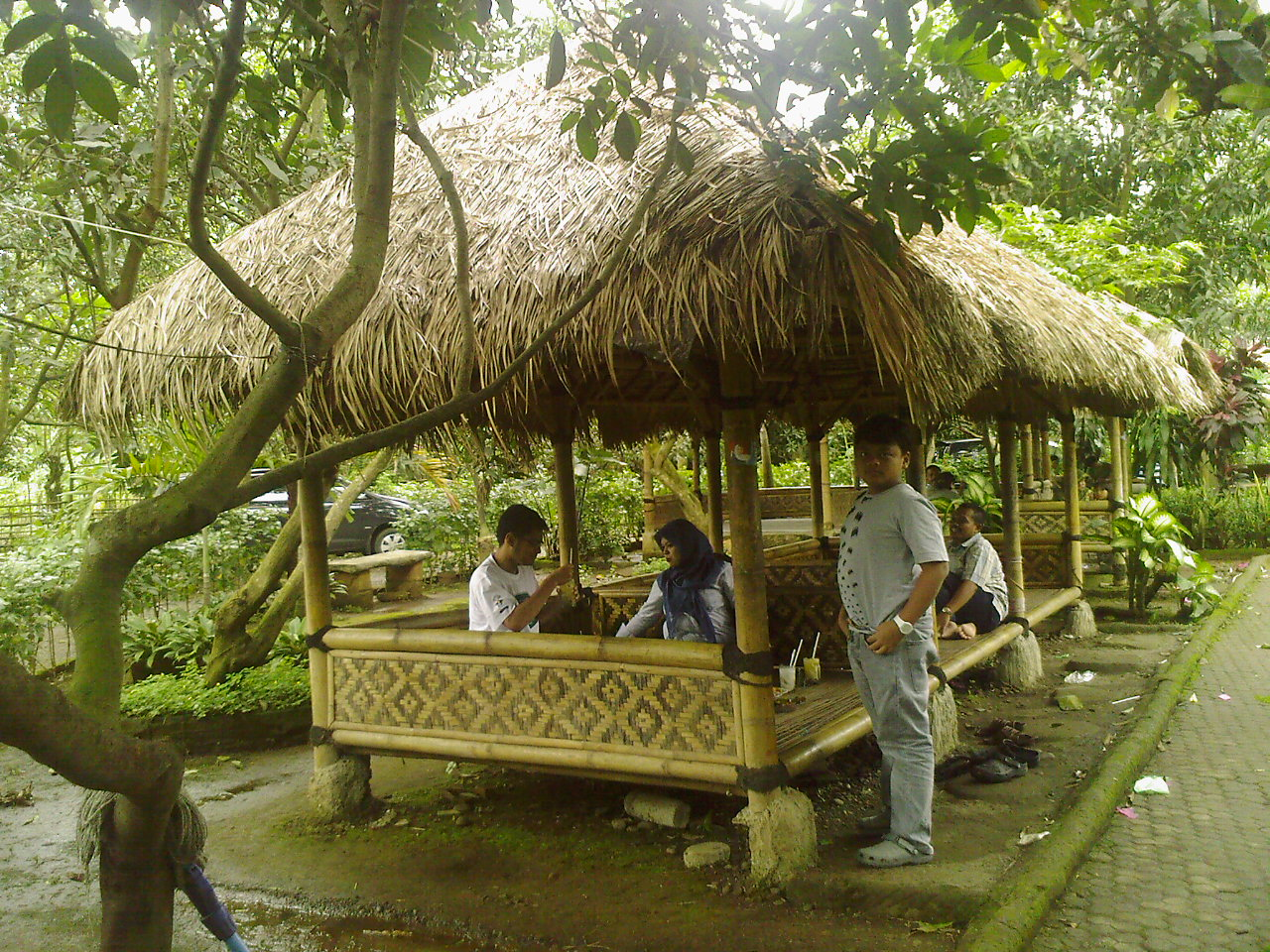 Saung pepes ikan mas Walahar ""